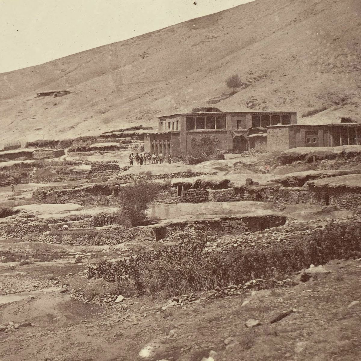 مهاباد - سویناس -ملک عثمان آغا گورک Gawerk - mahabad- house of lord - osman agha